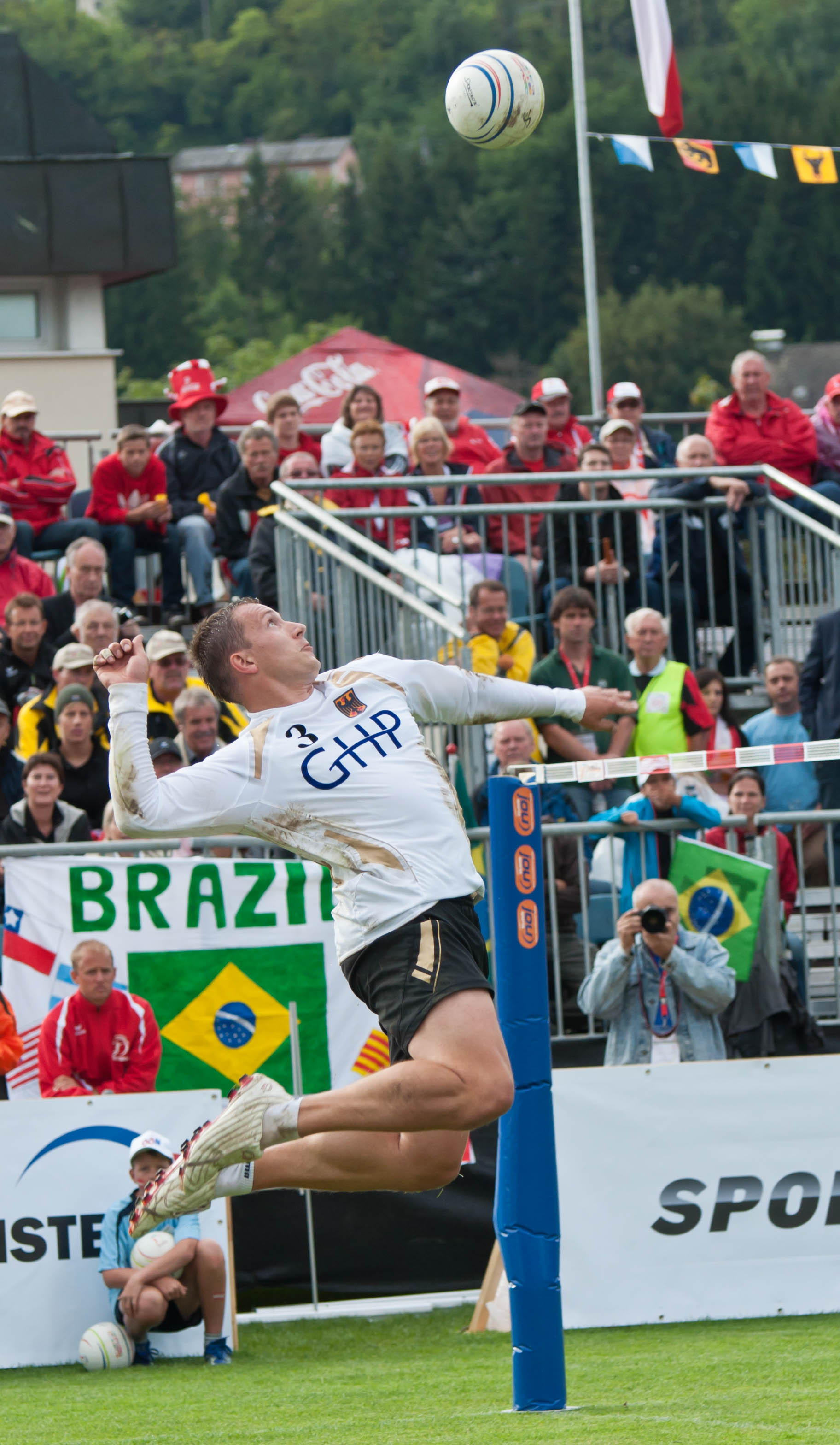 Steve Schmutzler - Faustball Weltmeisterschaft 2011